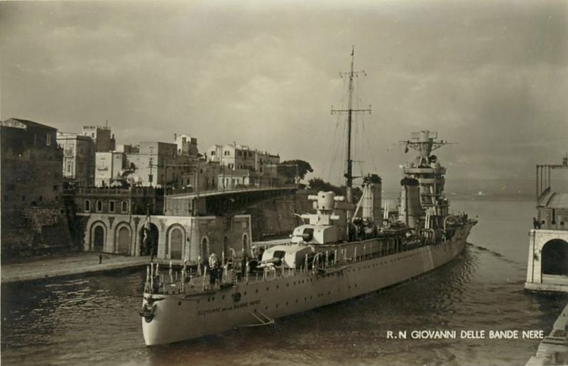 Le Giovanni delle Bande Nere quittant Tarente